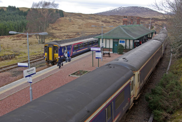 Rannoch Station